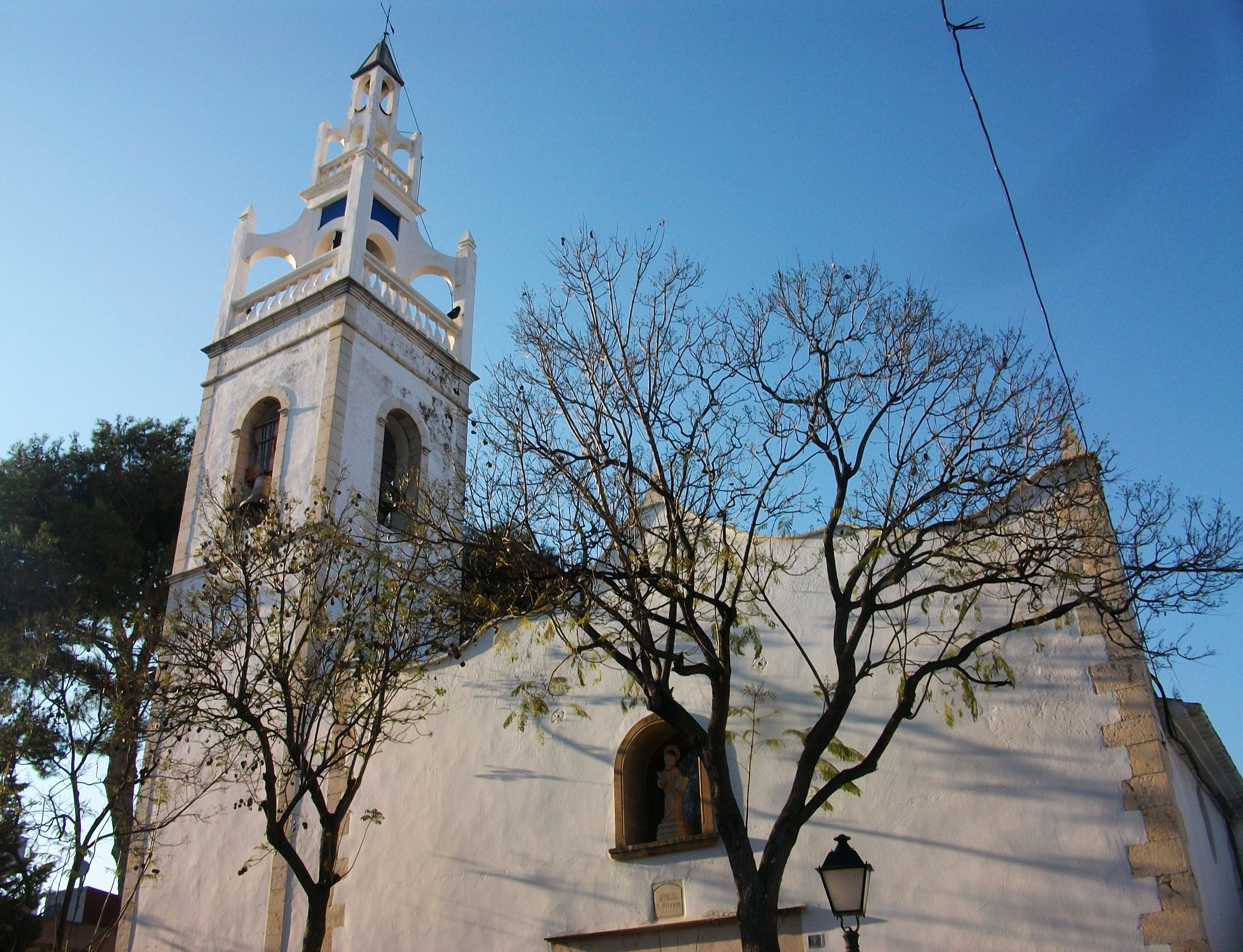 Església de Sant Mateu, la Xara, Marina Alta, País Valencià.